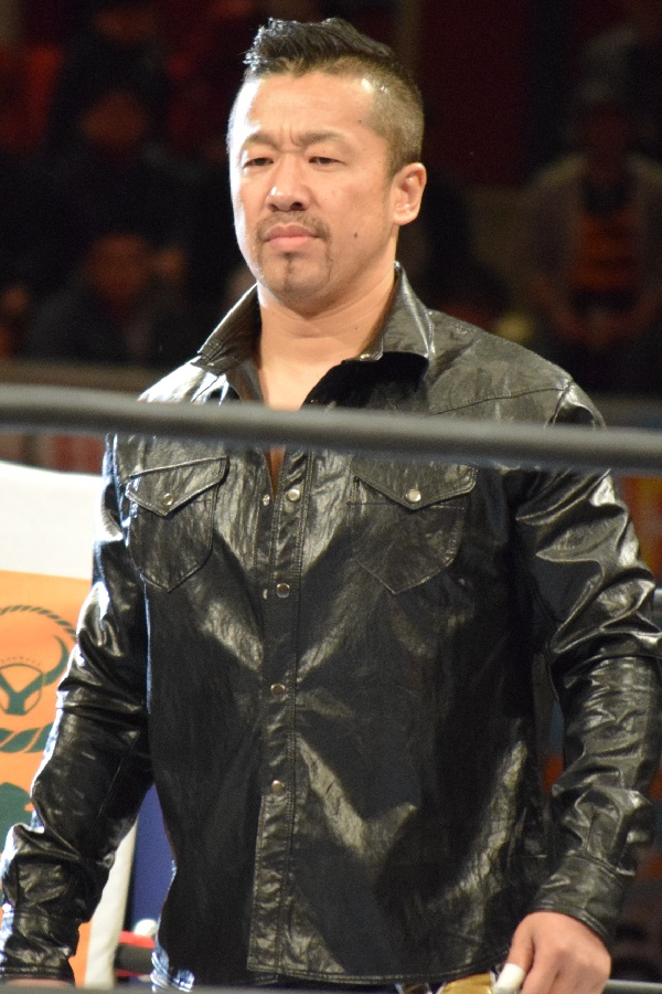 2017年3月12日 ベイコム総合体育館 「NEW JAPAN CUP 2017」 金丸義信